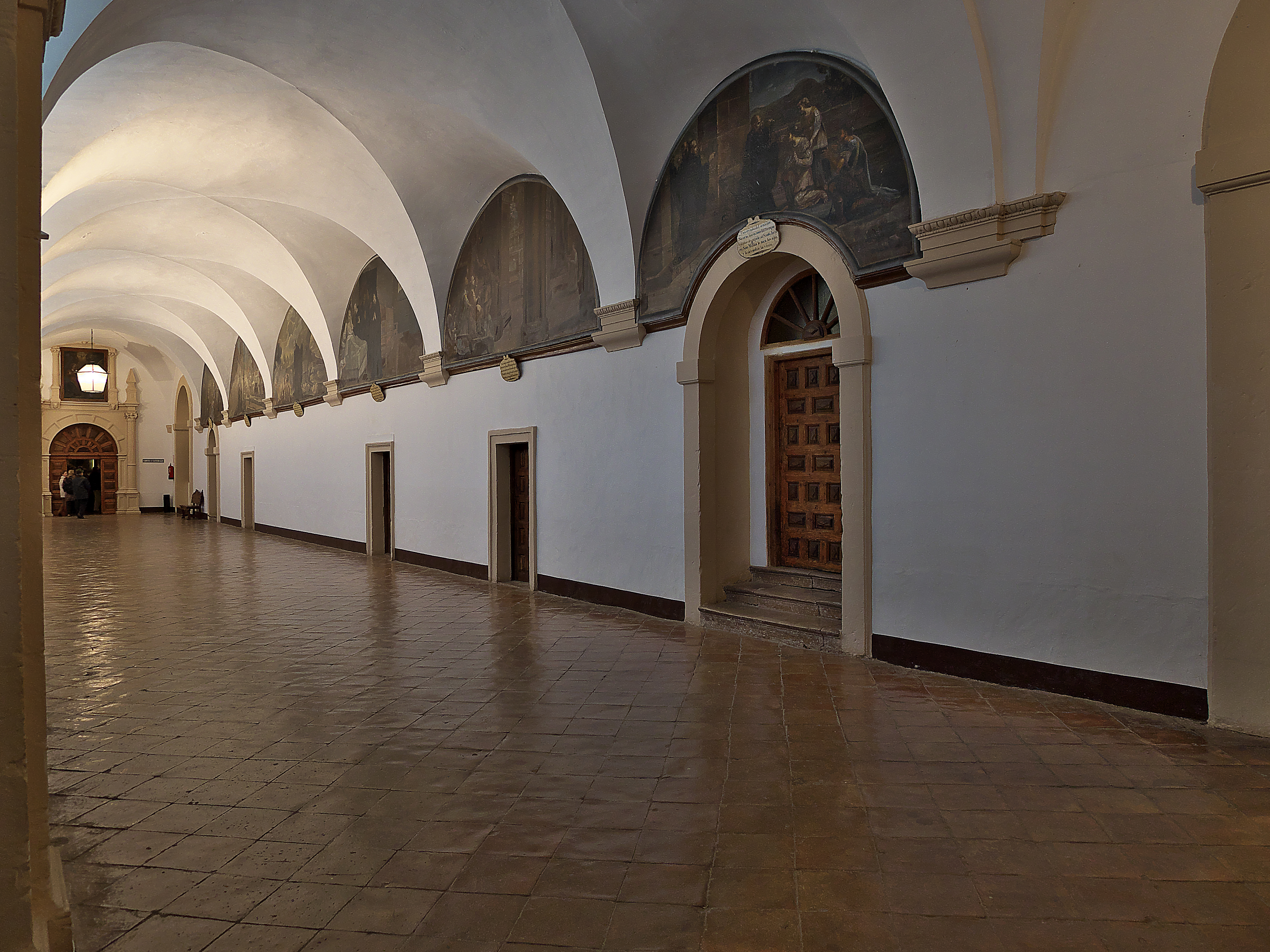 El abad fray Anselmo Petite contrata a José Bejes venticinco pinturas para el claustro alto sobre la vida de san Millán (1778-1781).